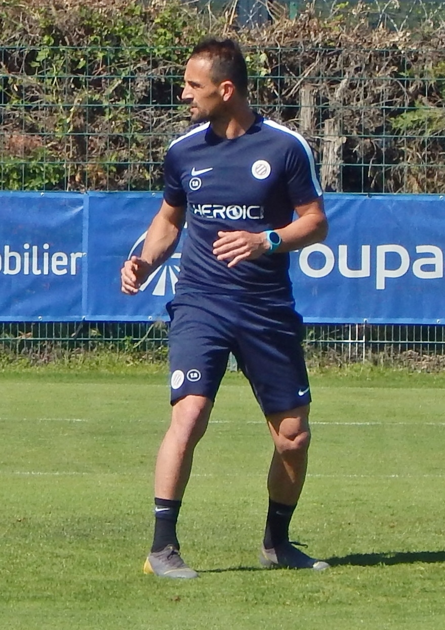 Teddy Richert, entraineur des gardiens au MHSC, mai 2019.